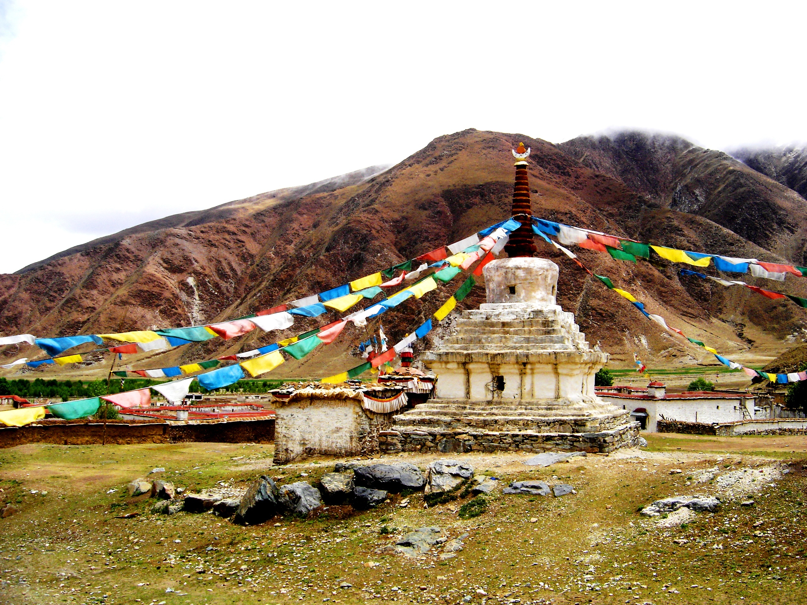 Stupa, Tibet